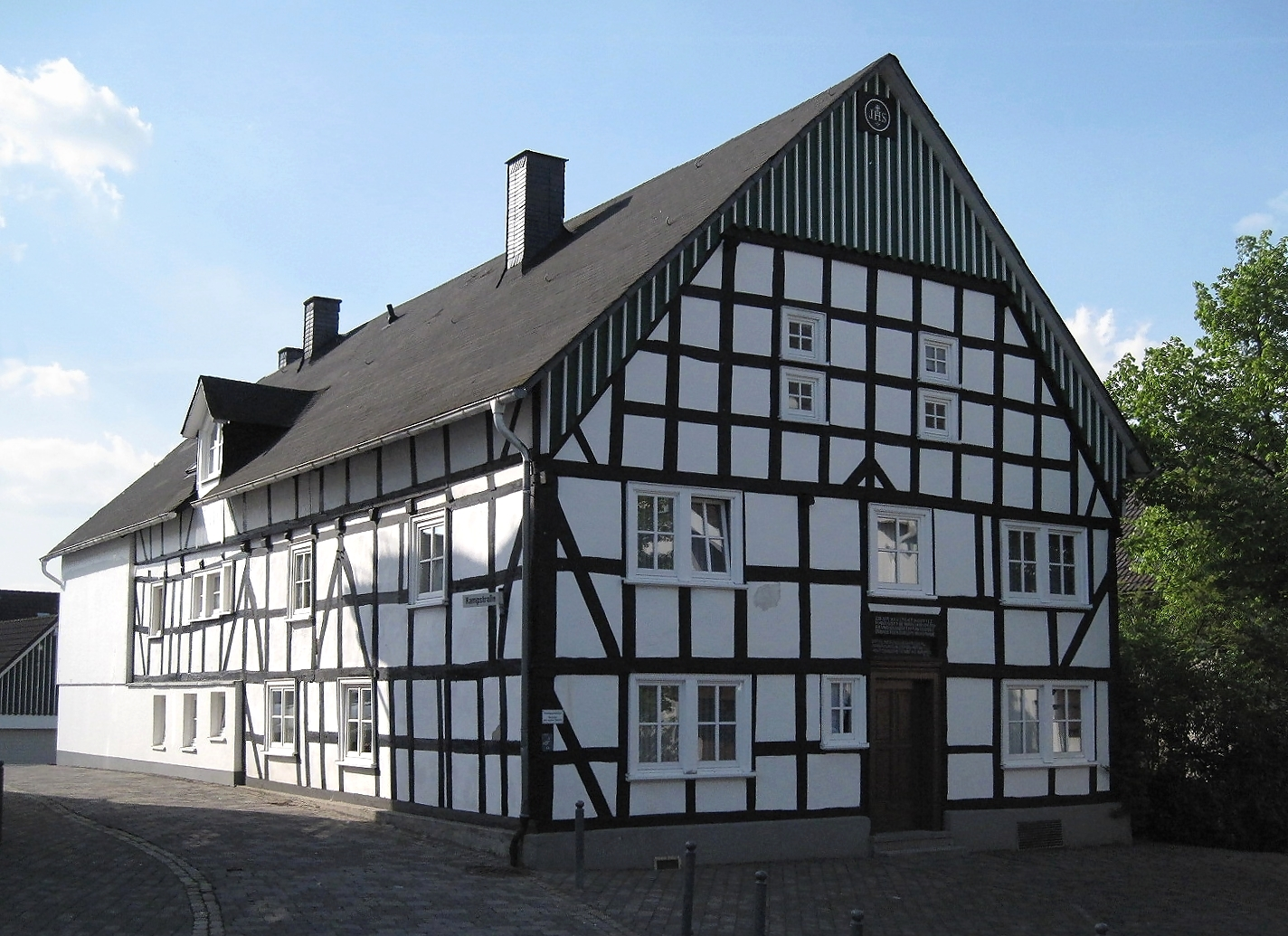 Unter Denkmalschutz stehendes Wohnhaus Bergstraße 8 (erbaut 1757) in Wenden.